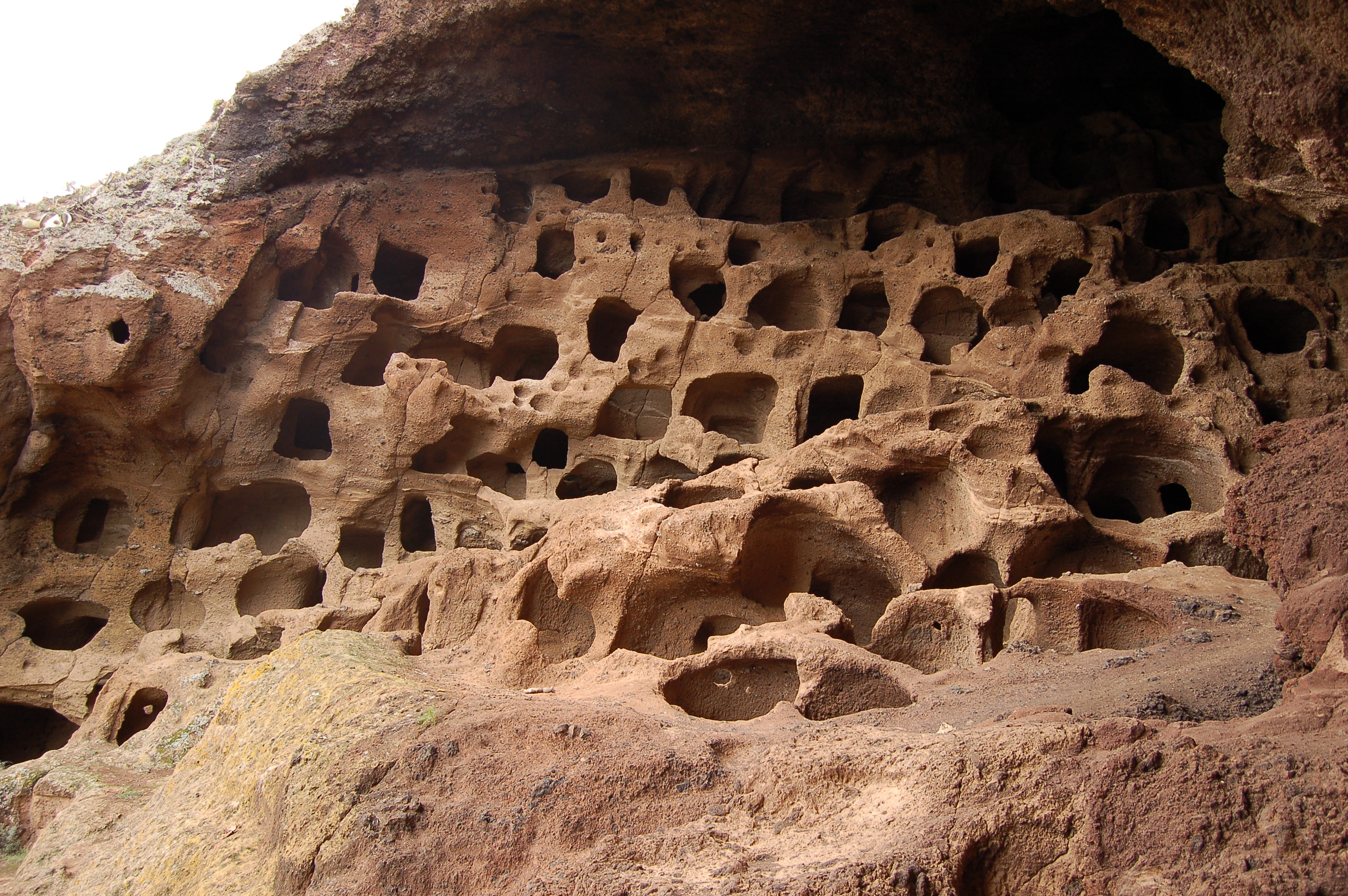 El cenobio de Valerón es un granero colectivo o comunal erigido por la población nativa de la isla de Gran Canaria antes de la conquista castellana. Está datado entre los siglos XI y XV.